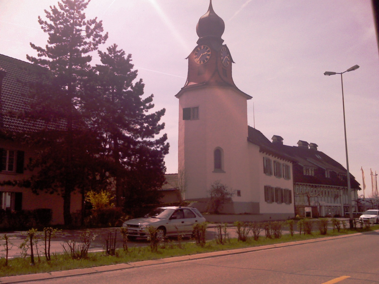 Preĝejo de Hegnau, komunumo Volketswil, Kantono Zuriko, Svislando